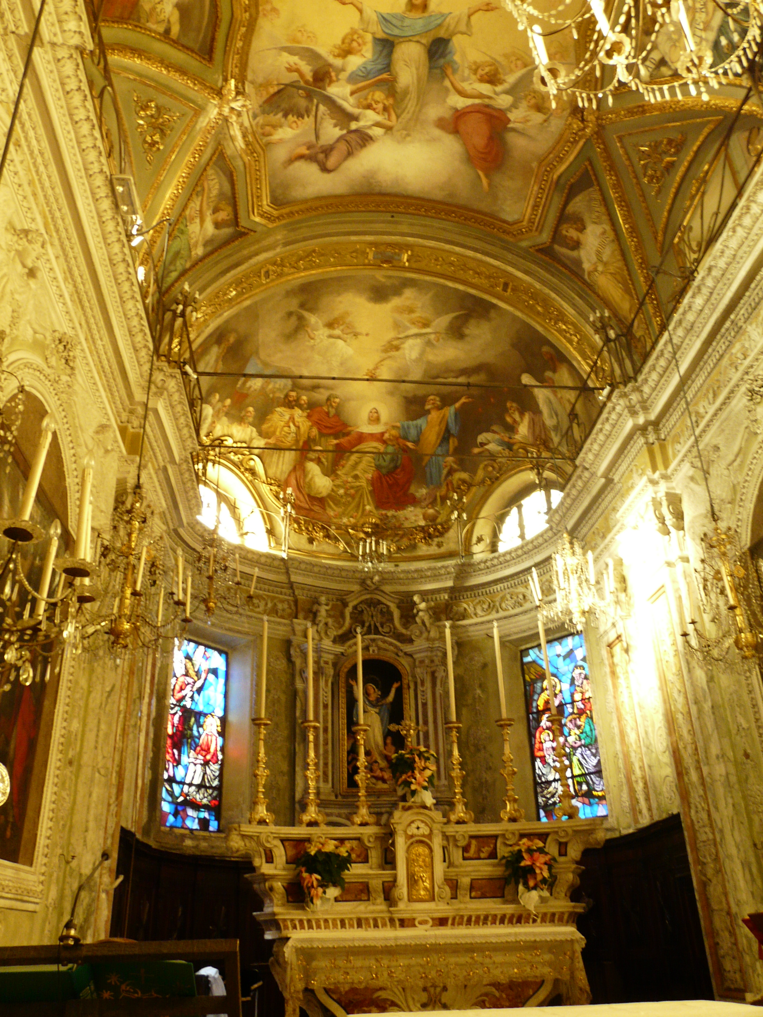 Altare maggiore della chiesa di Nostra Signora Assunta, Santa Maria del Campo, Rapallo, Liguria, Italia